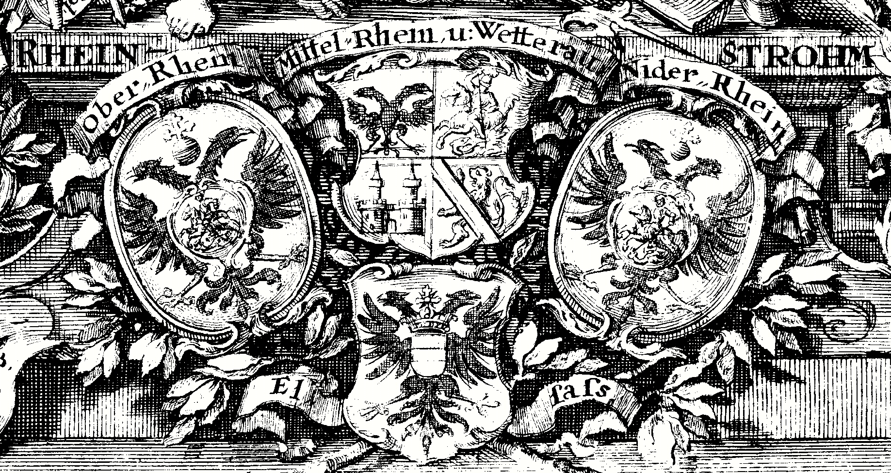 Symbolische Darstellung für die drei Ritterkanton am Rheimstrom